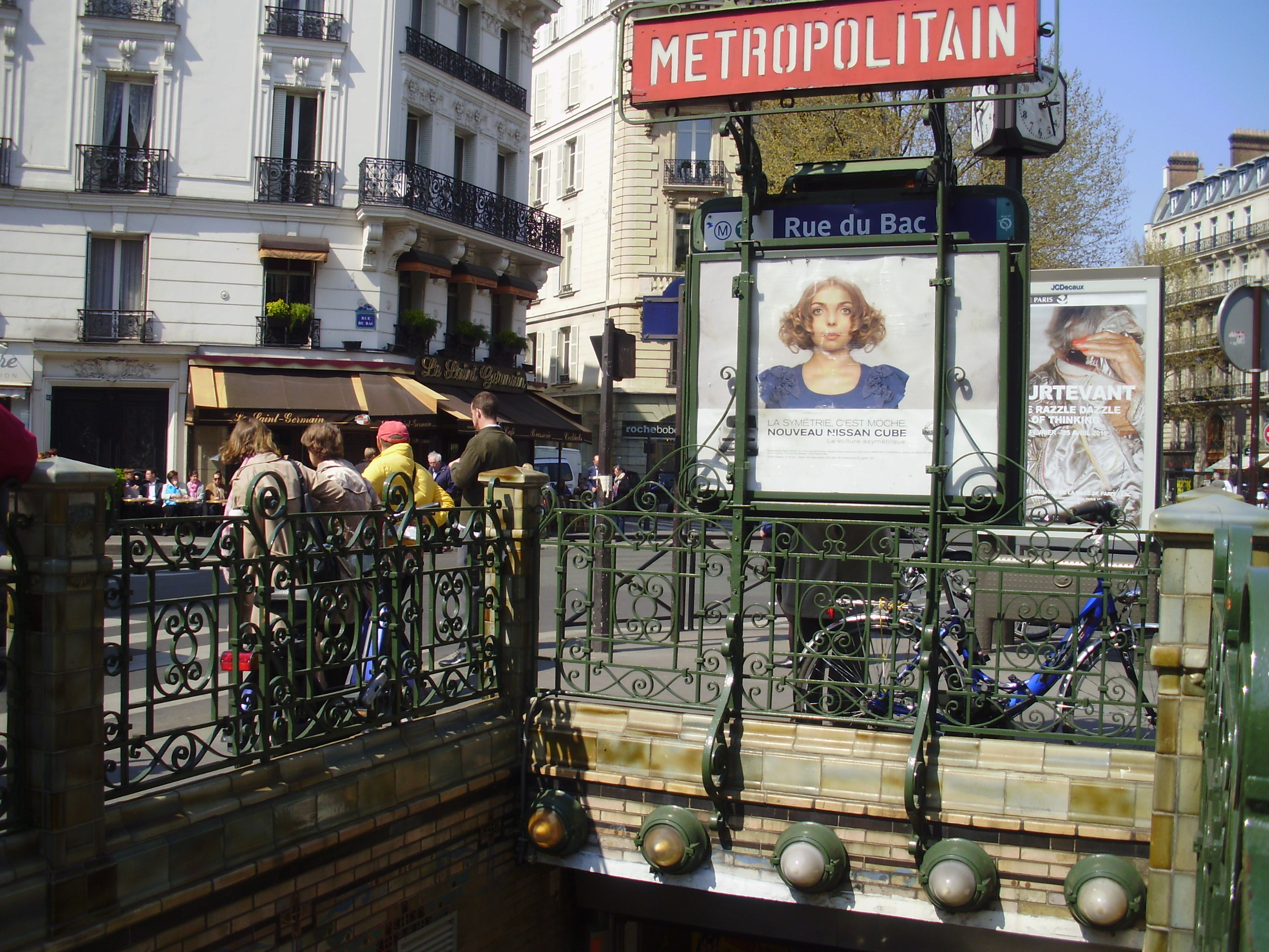 Entrée de la station Rue du Bac du métro de Paris.